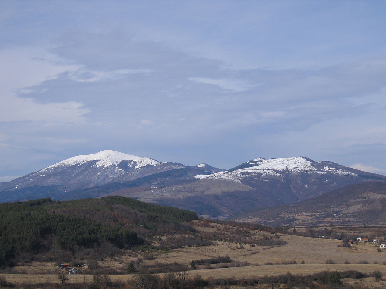 Връх Руй заснет от село Глоговица 05.03.2006 автор: Иван Бориславов